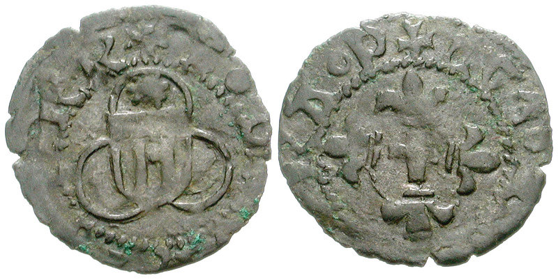 Switzerland, Waadt (Vaud). Évêché de Lausanne. Benoît de Montferrand, Bishop, 1476-1491. BI Denier (15mm, 0.47 g, 9h). + B • D [mOnTЄFЄ]RR, arms of Monteferrand; star above; all within trilobe + AVЄ • m[ARIA • G]RA • P, cross flourée. Dolivo 74 var. (legends); HMZ, Schweiz 1-523a. VF.